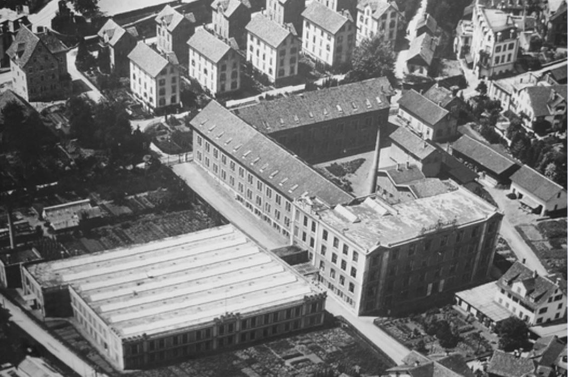 Gessner AG, Wädenswil ZH, Schweiz, 1910-1920